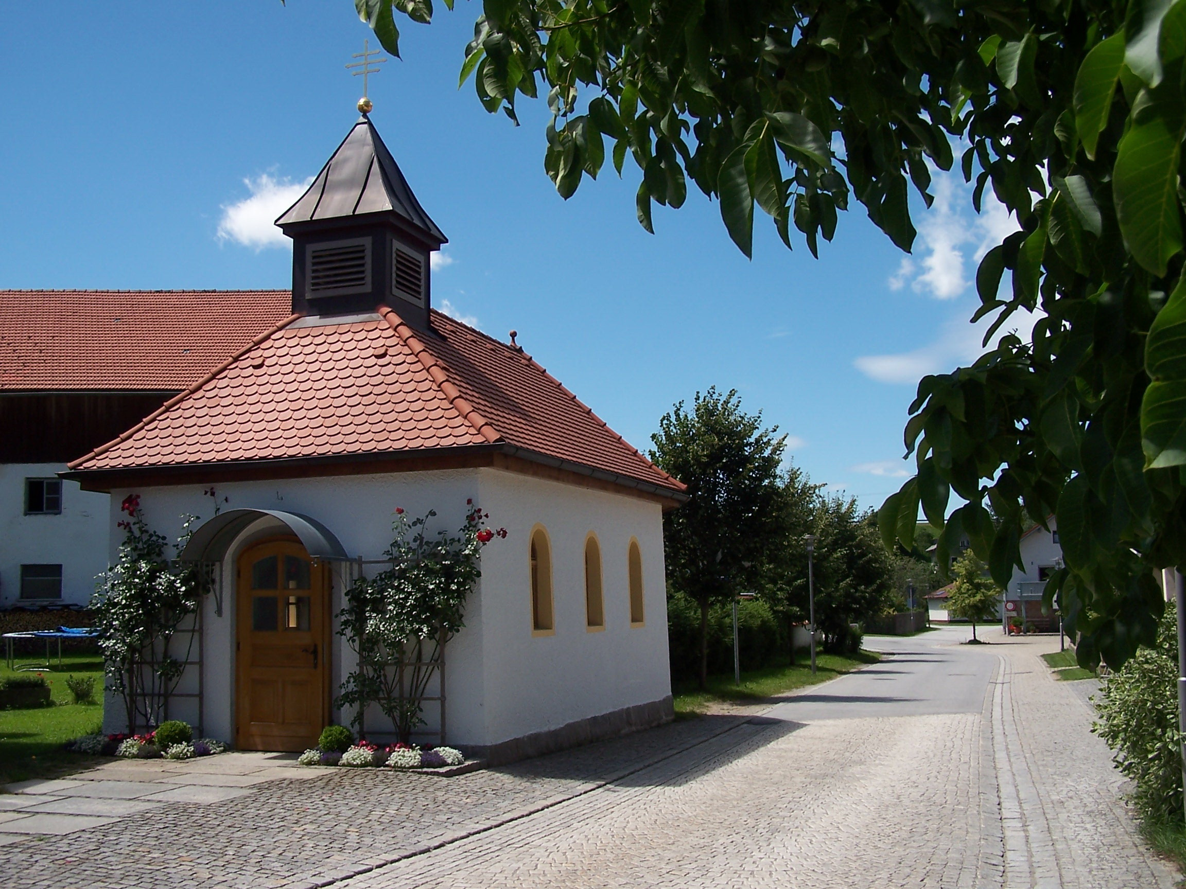 Waldkirchen, Schiefeweg, Kapellenweg. Ortskapelle, 1913; mit Ausstattung.